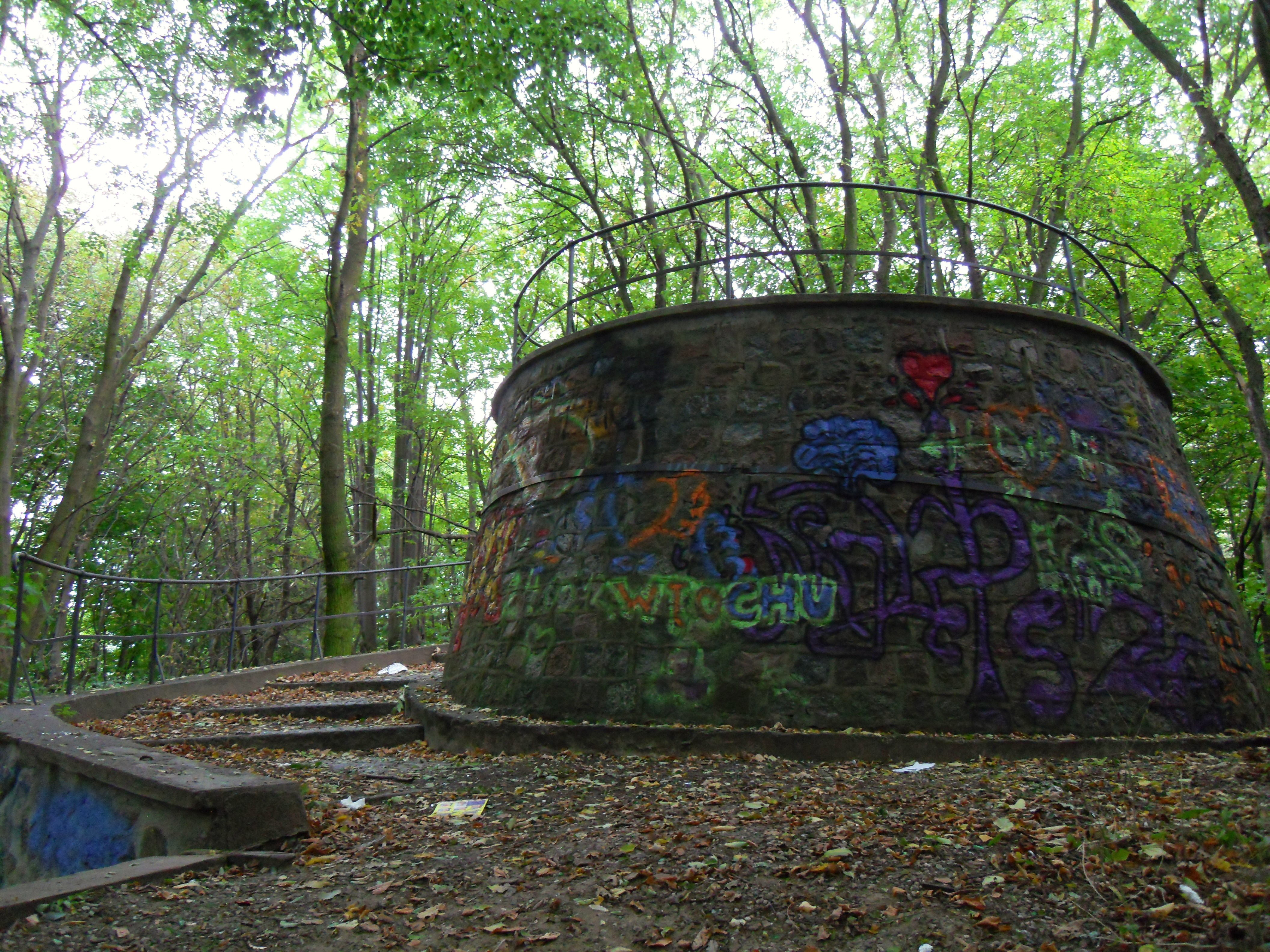 Gdańsk Wrzeszcz Górny. Królewskie Wzgórze, przedwojenny punkt widokowy na szczycie wzgórza.